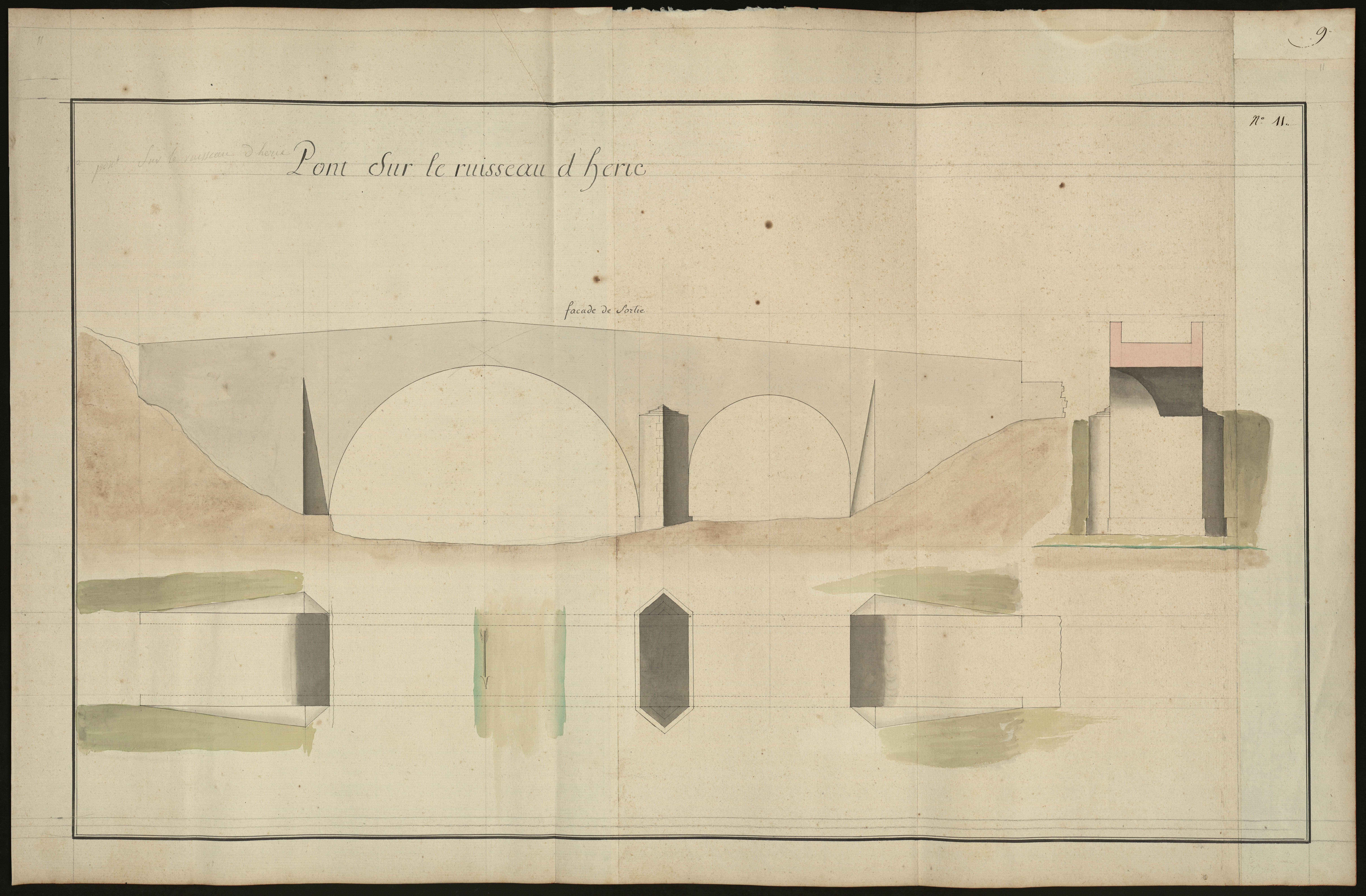 Mons-la-Trivalle (communauté de Voulte et Saint-Martin) : plan, profil et élévation du pont de l'Héric, sur le ruisseau du même nom